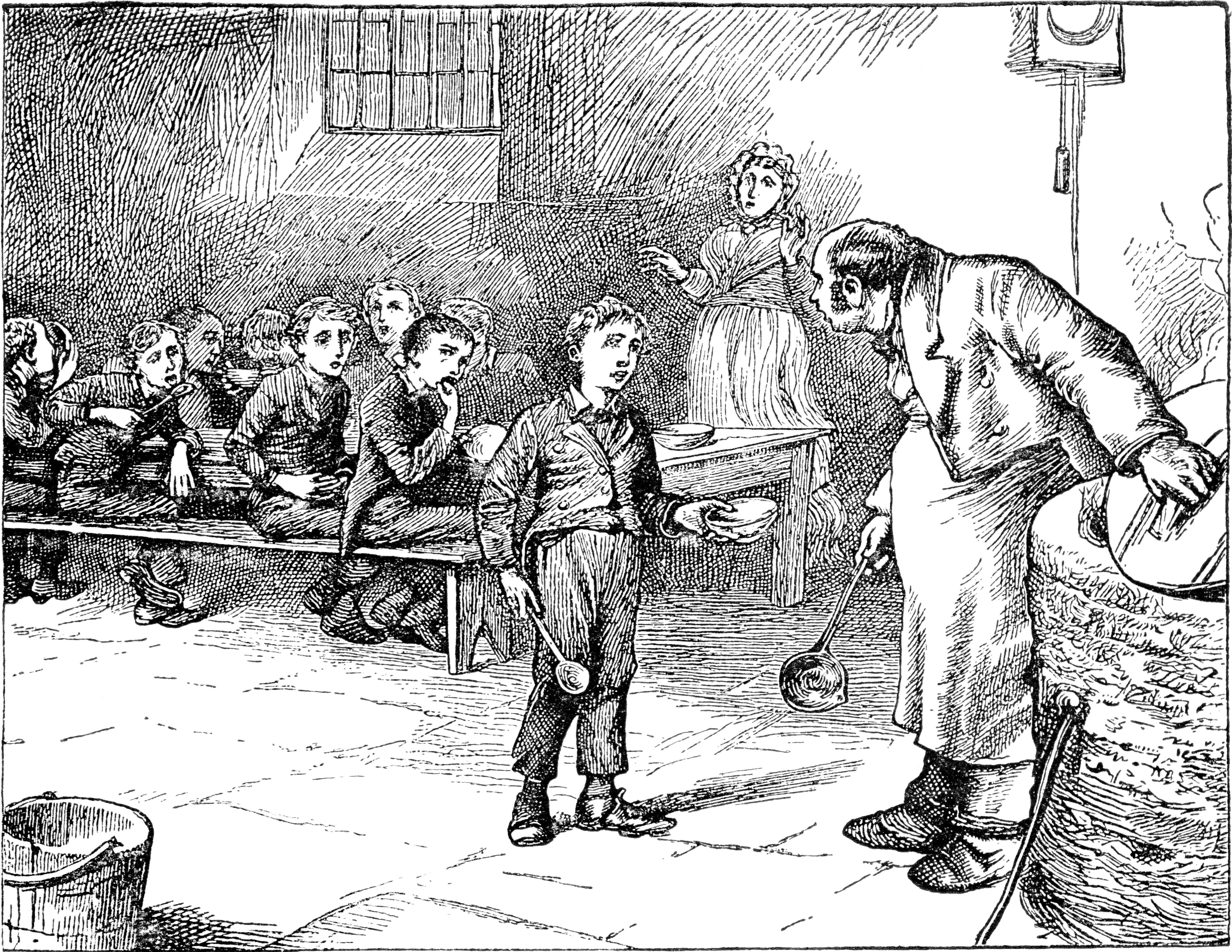 Illustration på sida 5 ur boken Oliver Twist: Samhällsroman från 1898